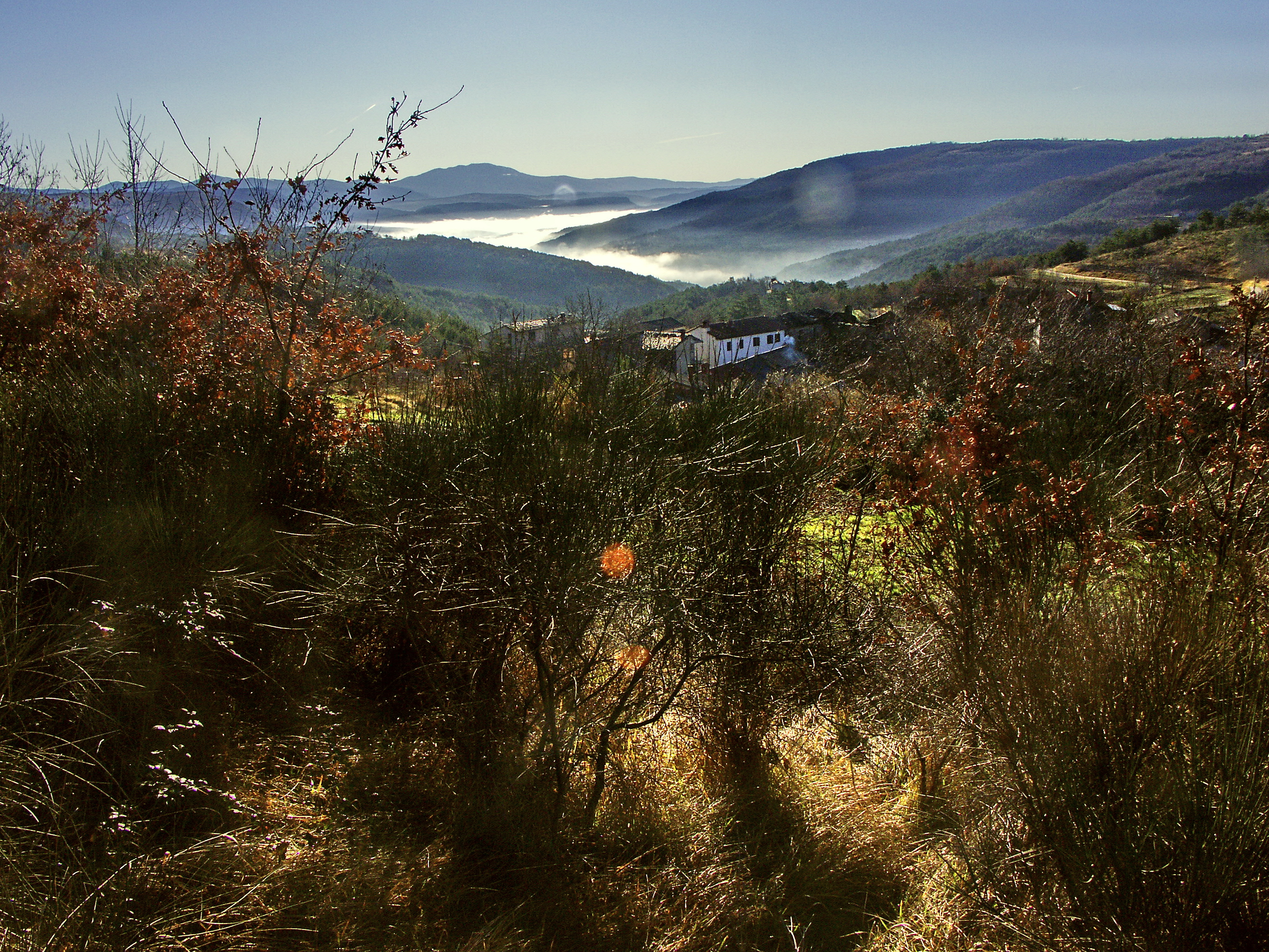 Pogled na Dolenjščino od Sokoličev.